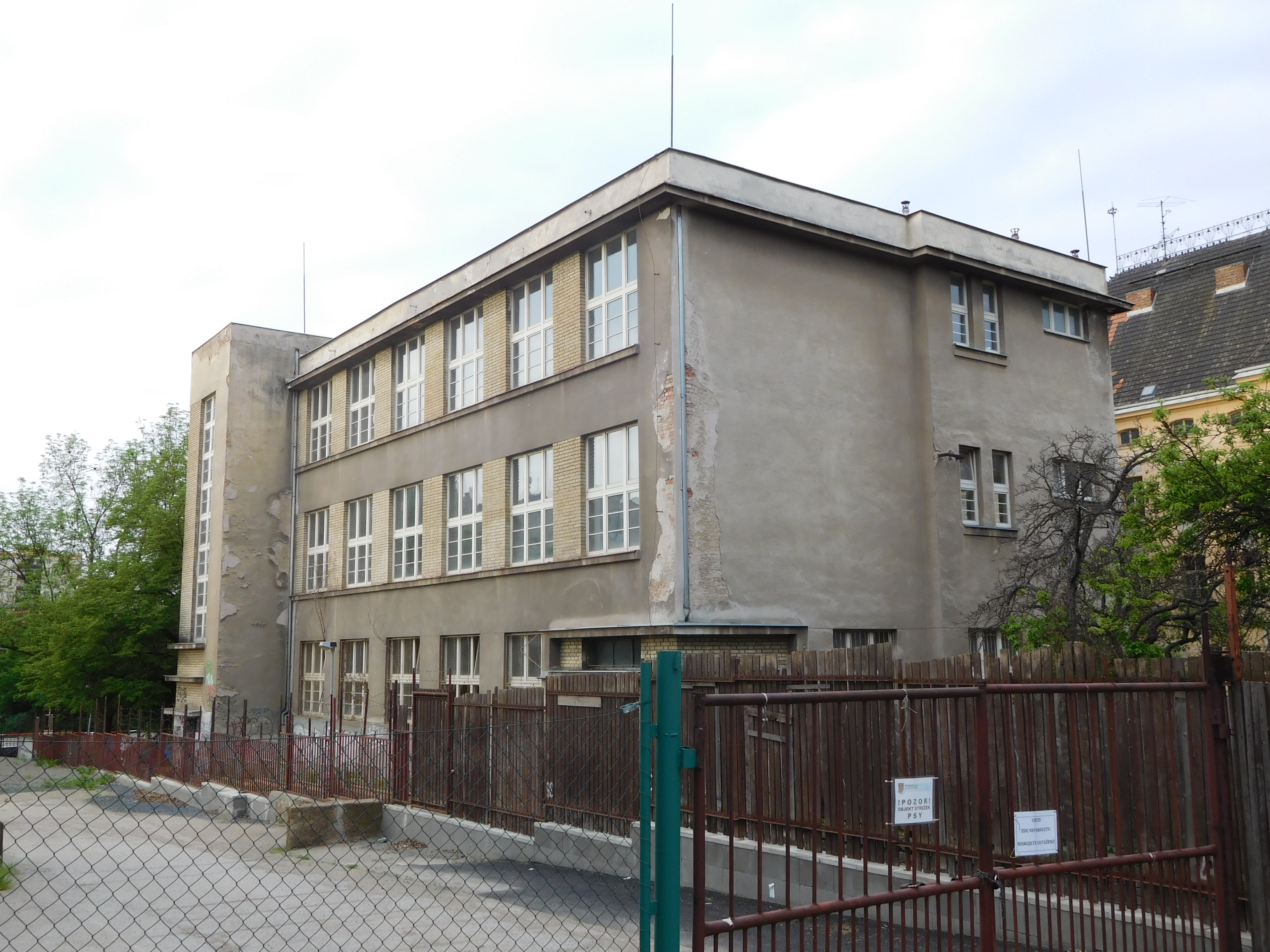 Praha - Strašnice, Saratovská 1, Nová strašnická škola - puristická přístavba z let 1927-9